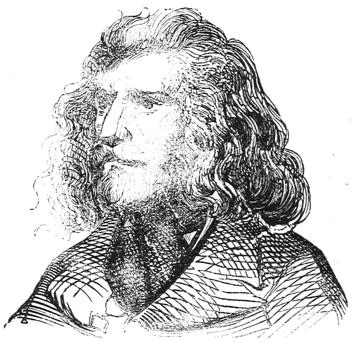 Demon Pursan. Illustration du Dictionnaire infernal de Jacques Auguste Simon Collin de Plancy par Louis Le Breton, 6eme édition, 1863.